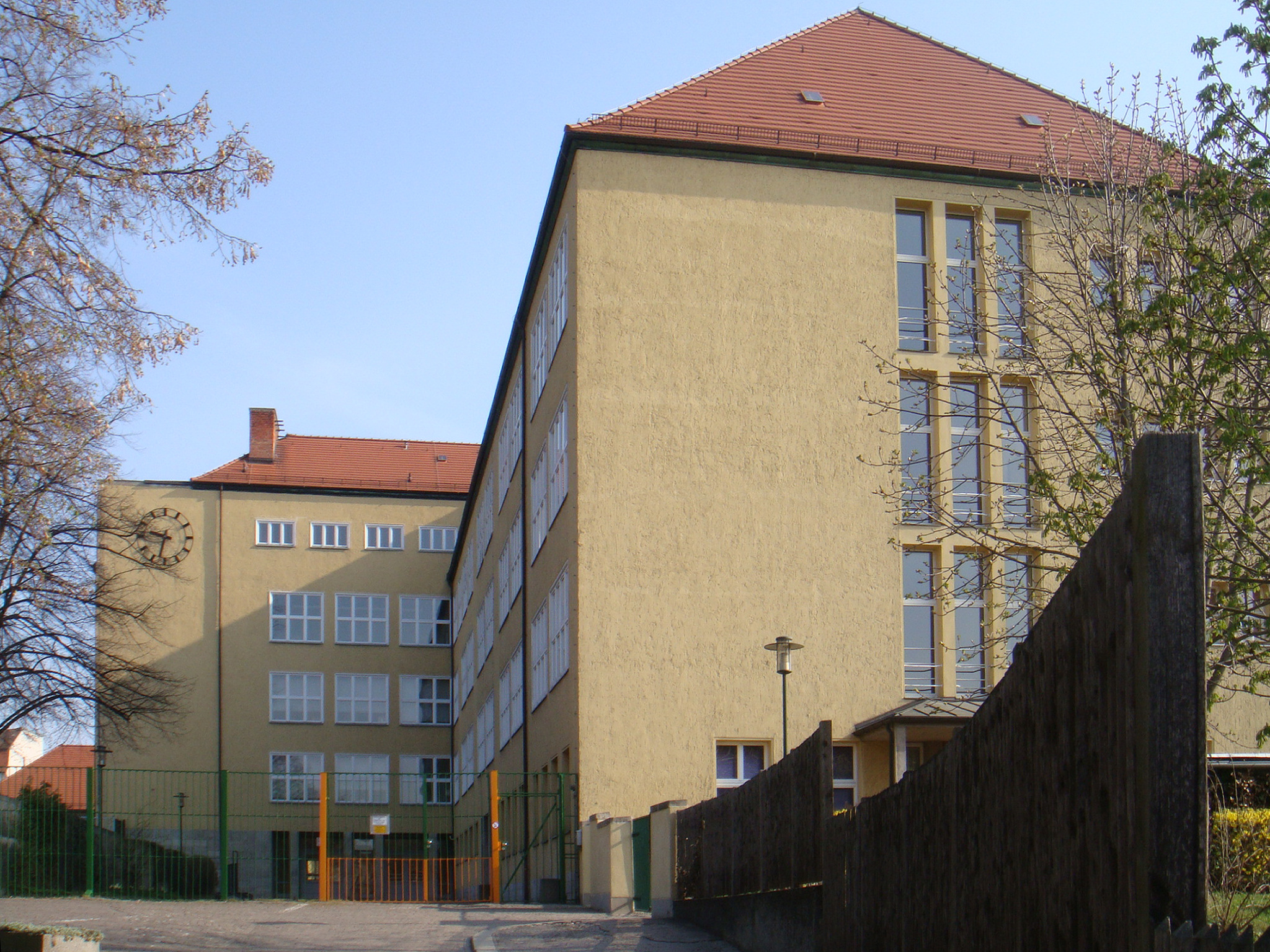 Gymnasium_Bergschule